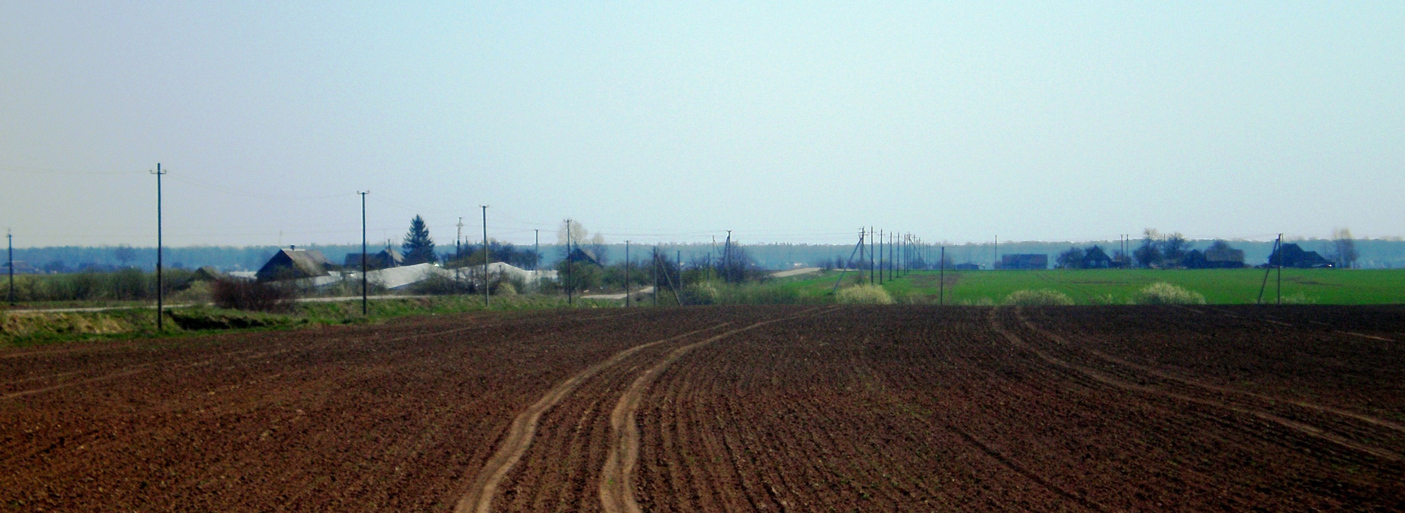 Karūnava nuo kelio į Vainikus, Josvainių sen., Kėdainių raj.